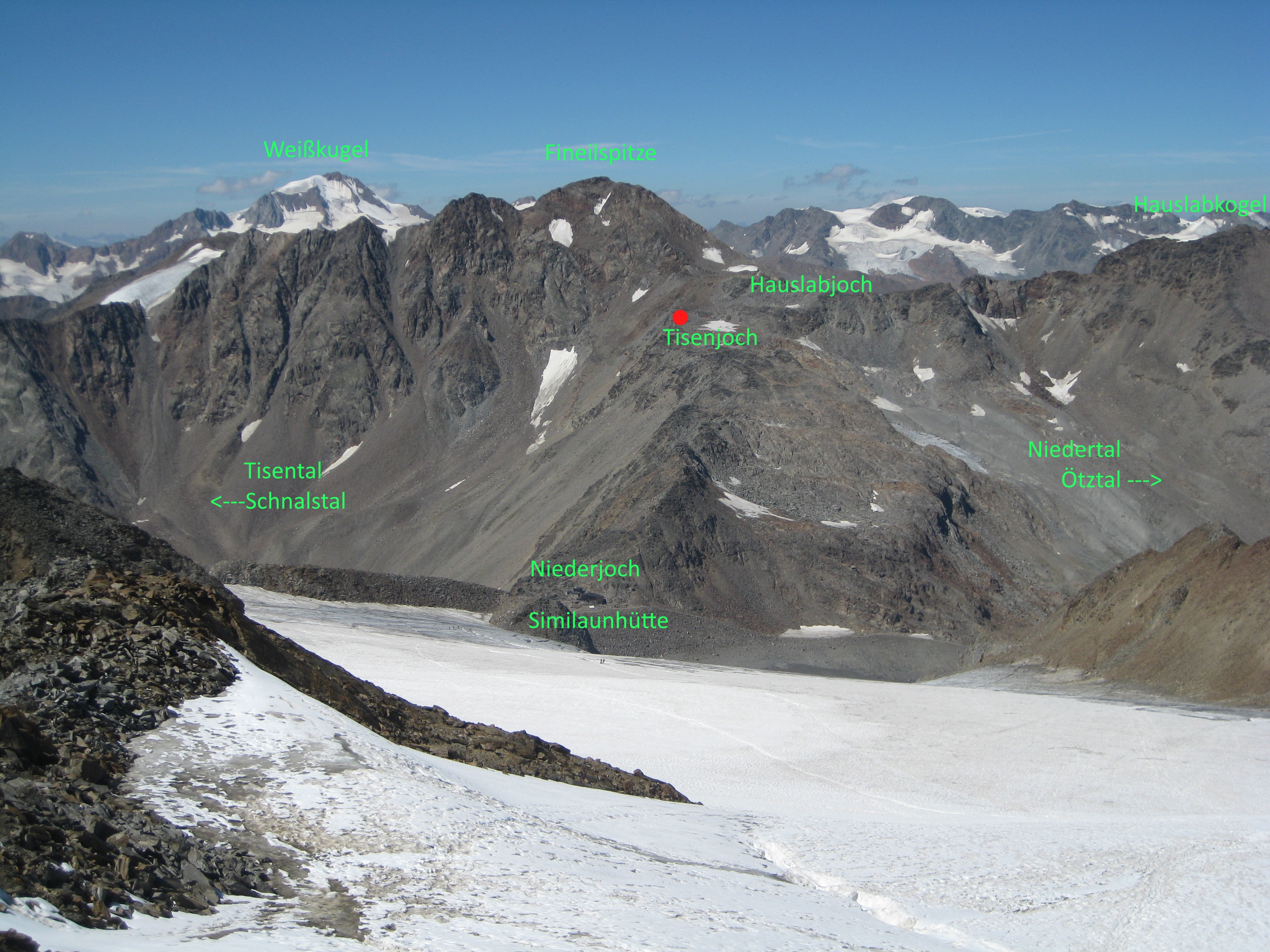 Die Fundstelle des Manns vom Tisenjoch (Ötzi) in der Gebirgswelt der Ötztaler Alpen. Das Bild wurde beim Aufstieg zum Similaun aufgenommen und zeigt den Blick Richtung Nordwesten. Die Gegend des Fundorts ist als roter Punkt markiert.